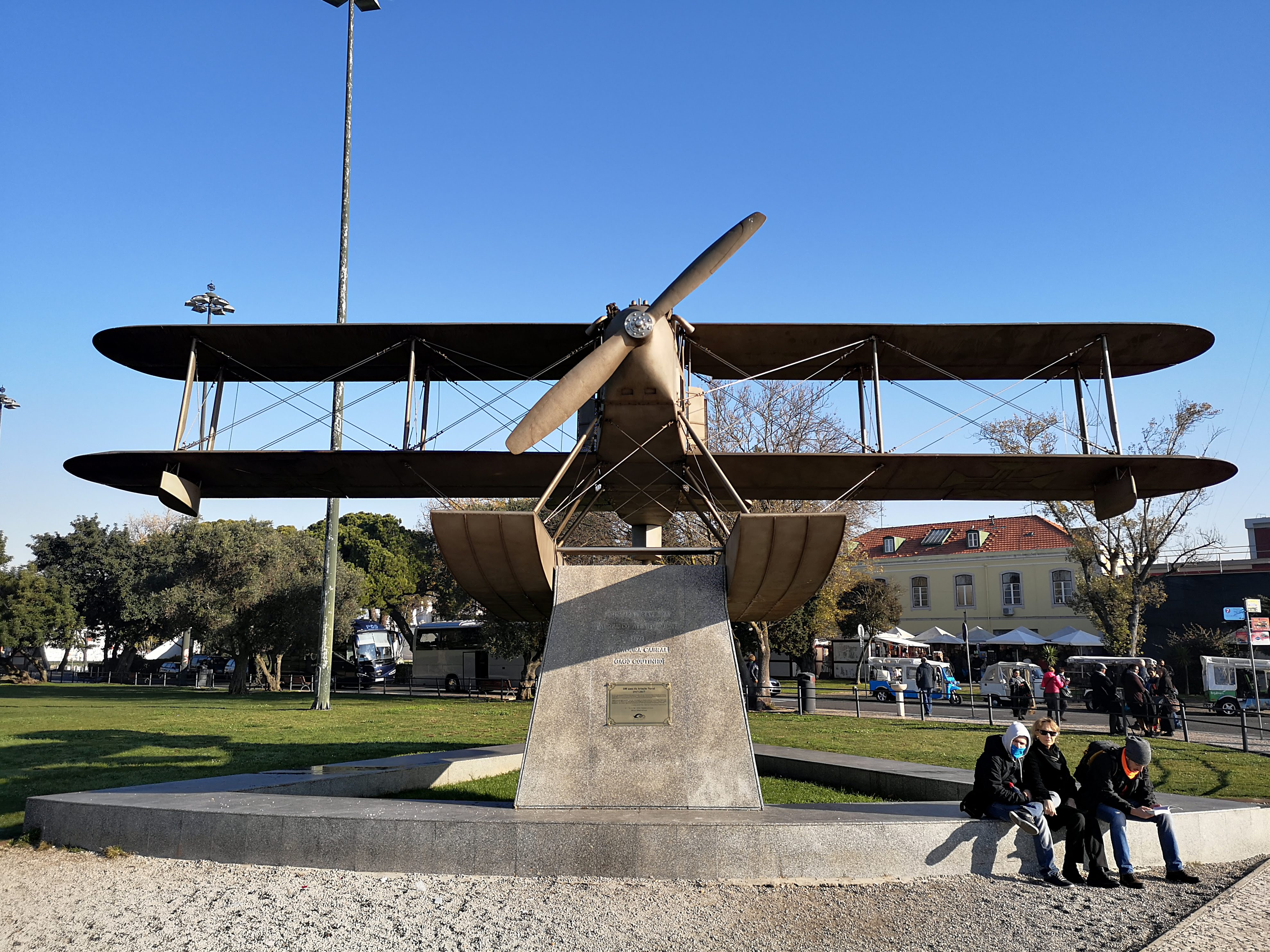 Belem (Lisbona) - monumento a Sacadura Cabral and Gago Coutinho